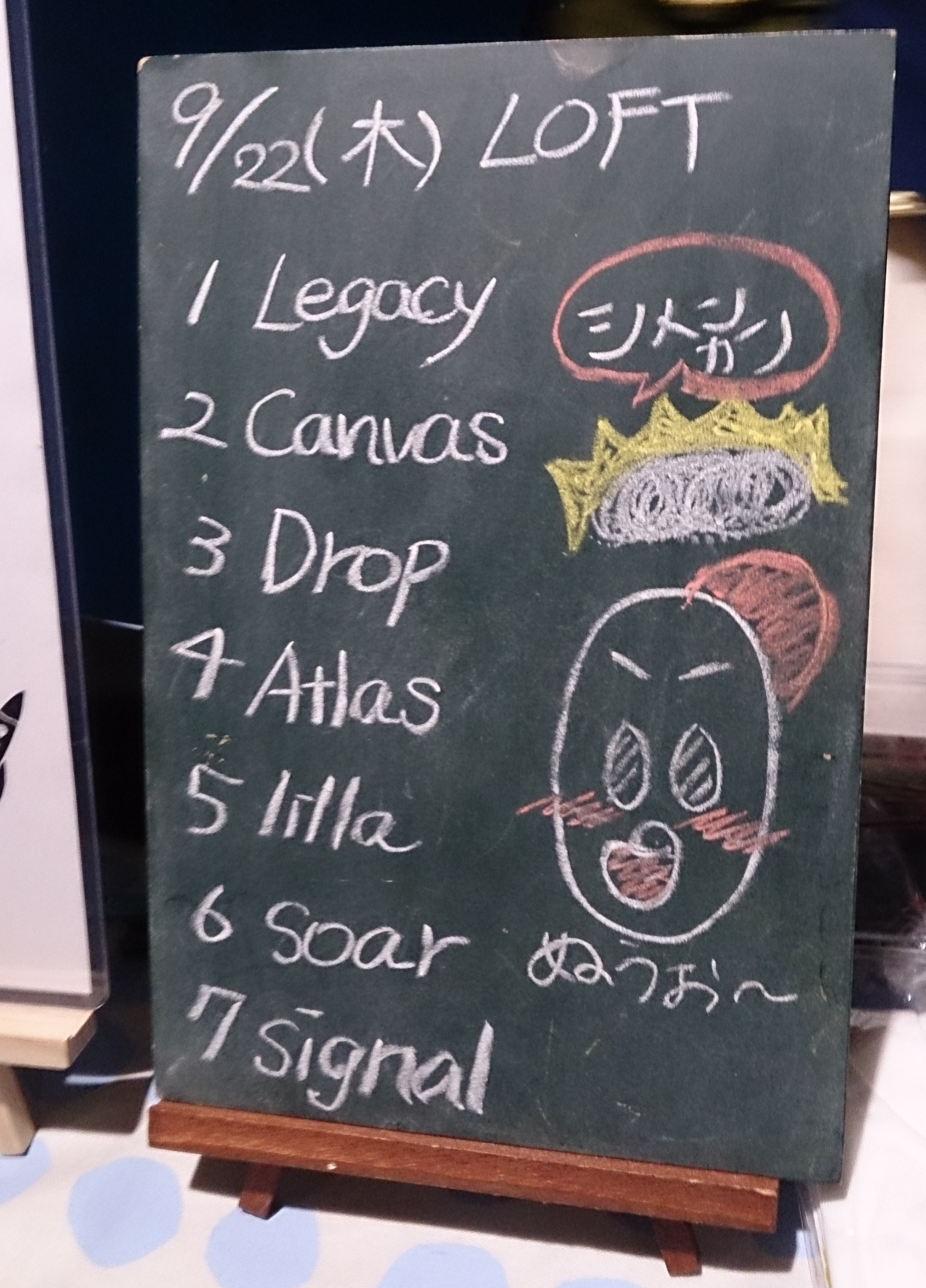 amiinAセトリボード(20160922(1))